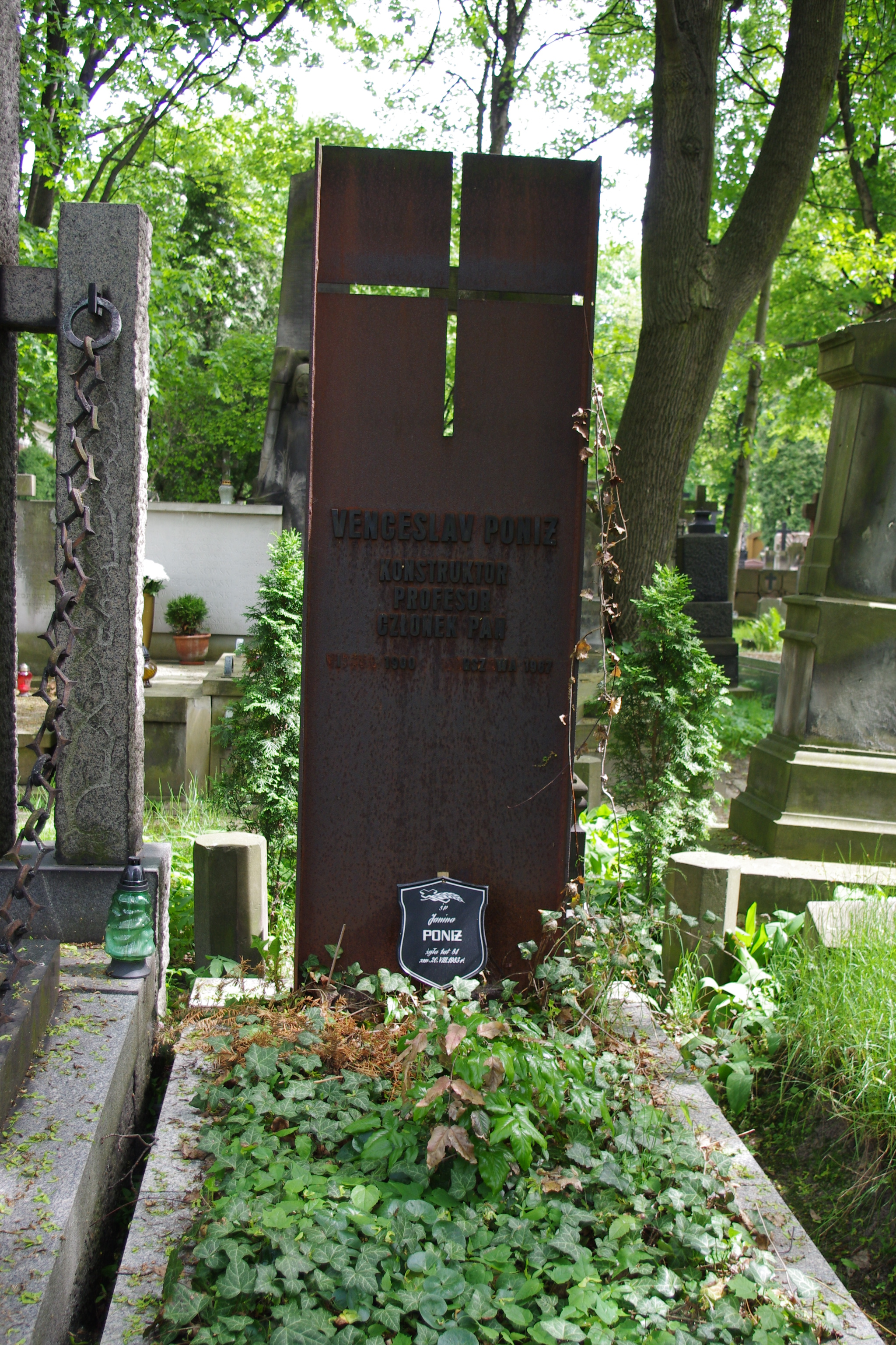 Grób inżyniera Wenczesława Poniża na Starych Powązkach w Warszawie